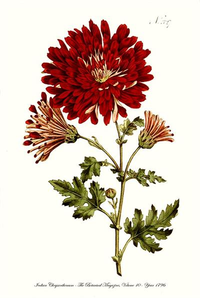 En 1790, le pépiniériste Cels de Montrouge, envoya quelques pieds de chrysanthèmes pourpres en Angleterre. Ils étaient arrivés à Marseille en 1789, ramenés de Chine par le capitaine Blancard. Ils fleurirent en 1795 et une description et illustration de Curtis parut dans le Botanical Magazine en 1796